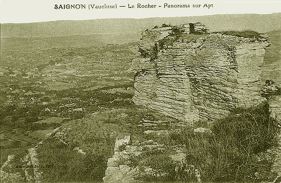 Vue du Rocher sur le pays d'Apt